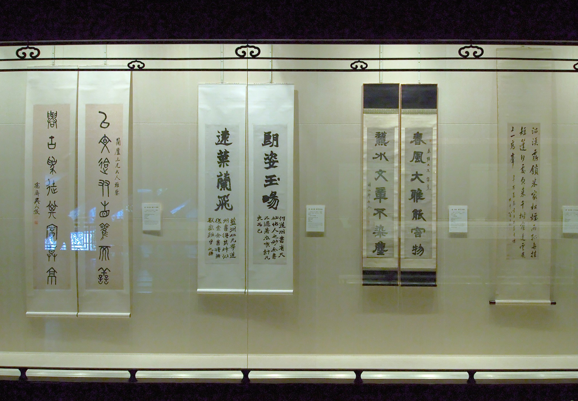 Hanging scrolls, Shanghai